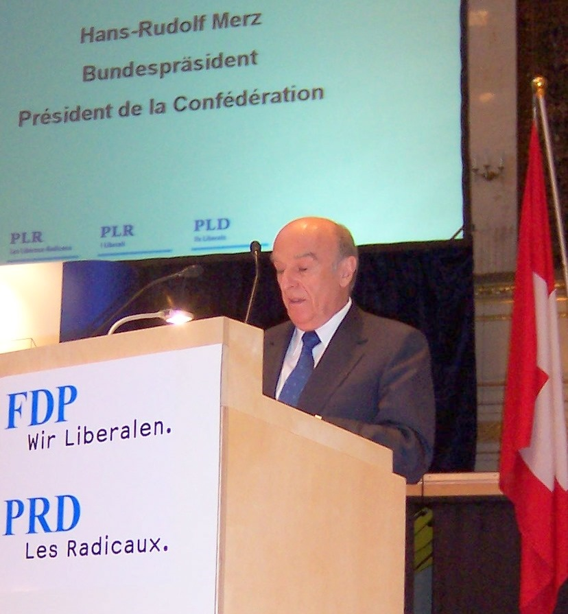 Bundespräsident Hans-Rudolf Merz redet an der Gründungs-DV der «FDP. Die Liberalen» in Bern